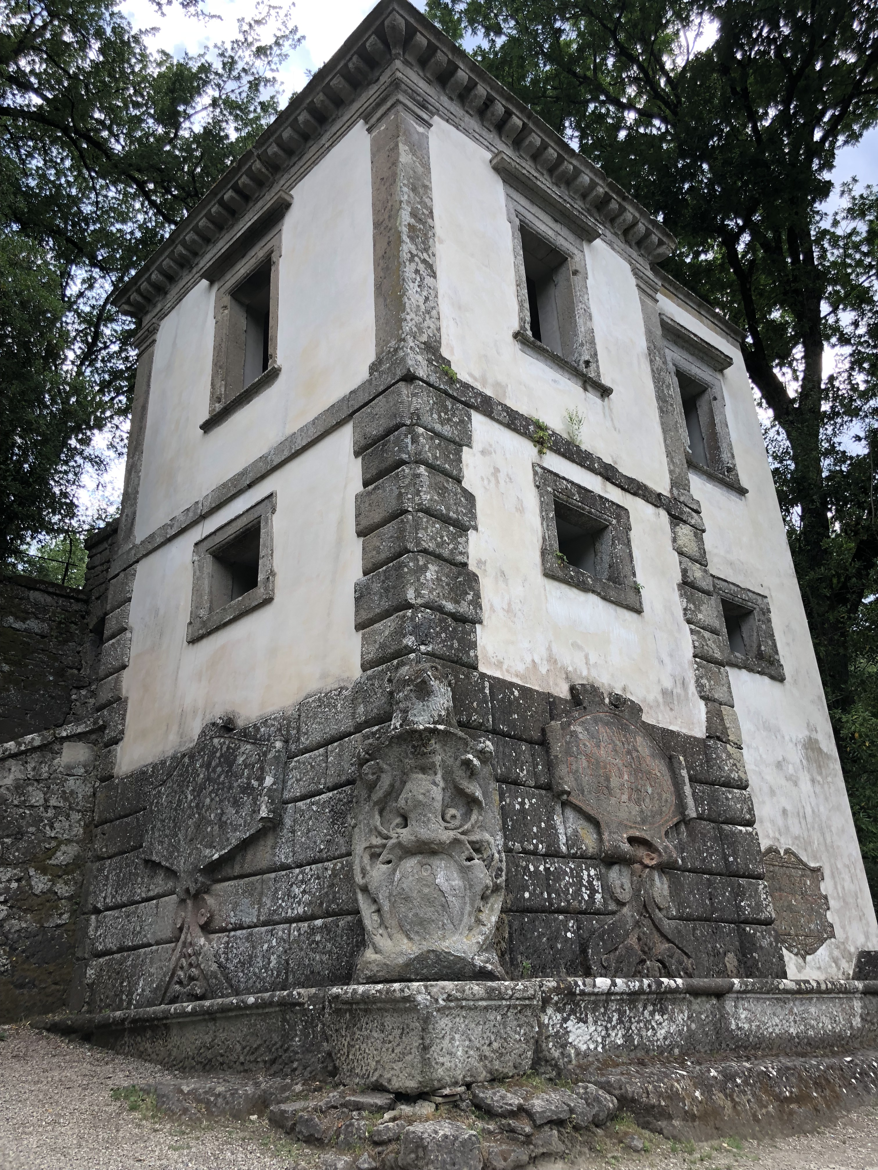 Casa pendente